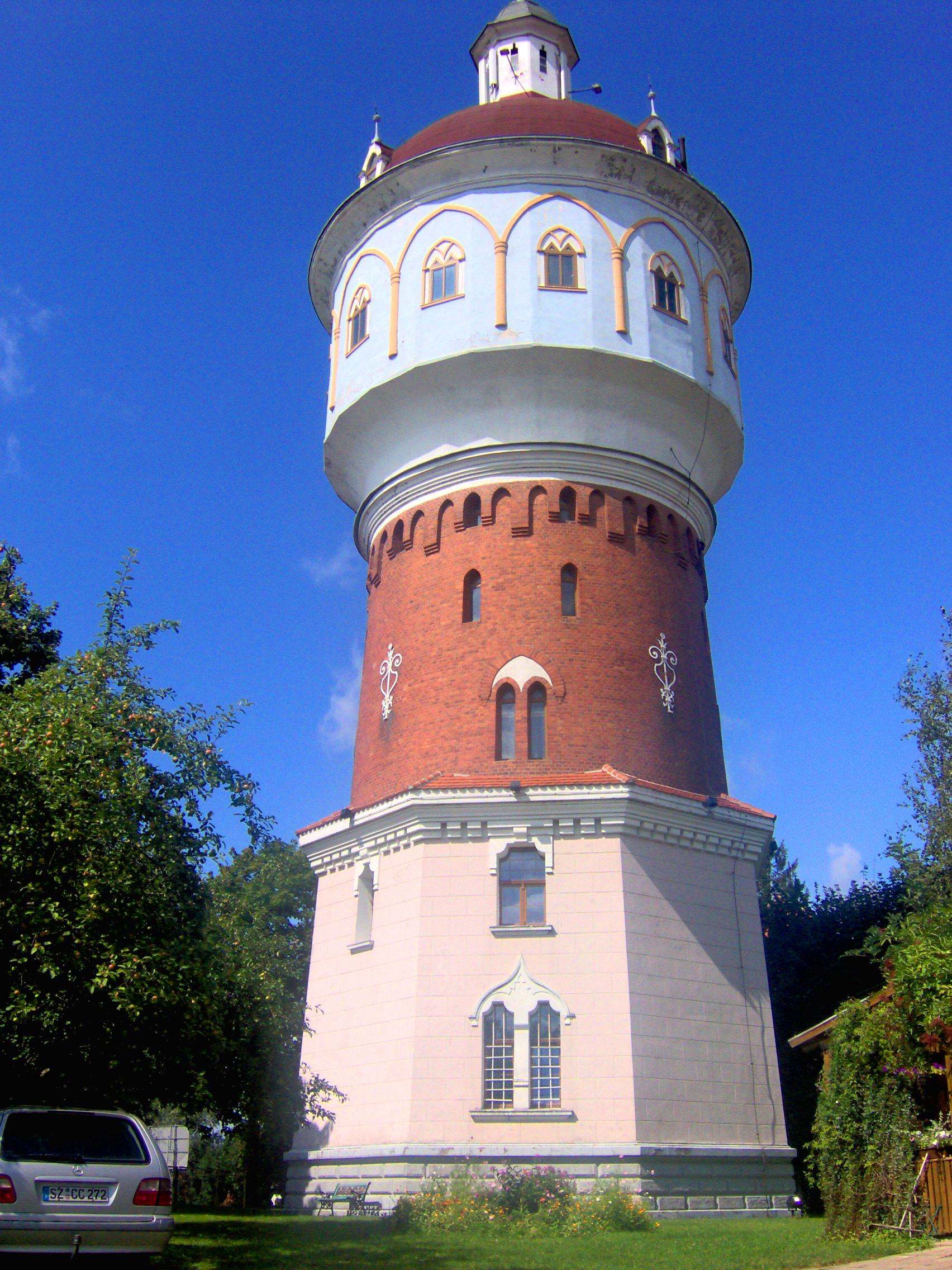 Wieża Ciśnień w Ełku. Mieści się w niej Muzeum Kropli Wody